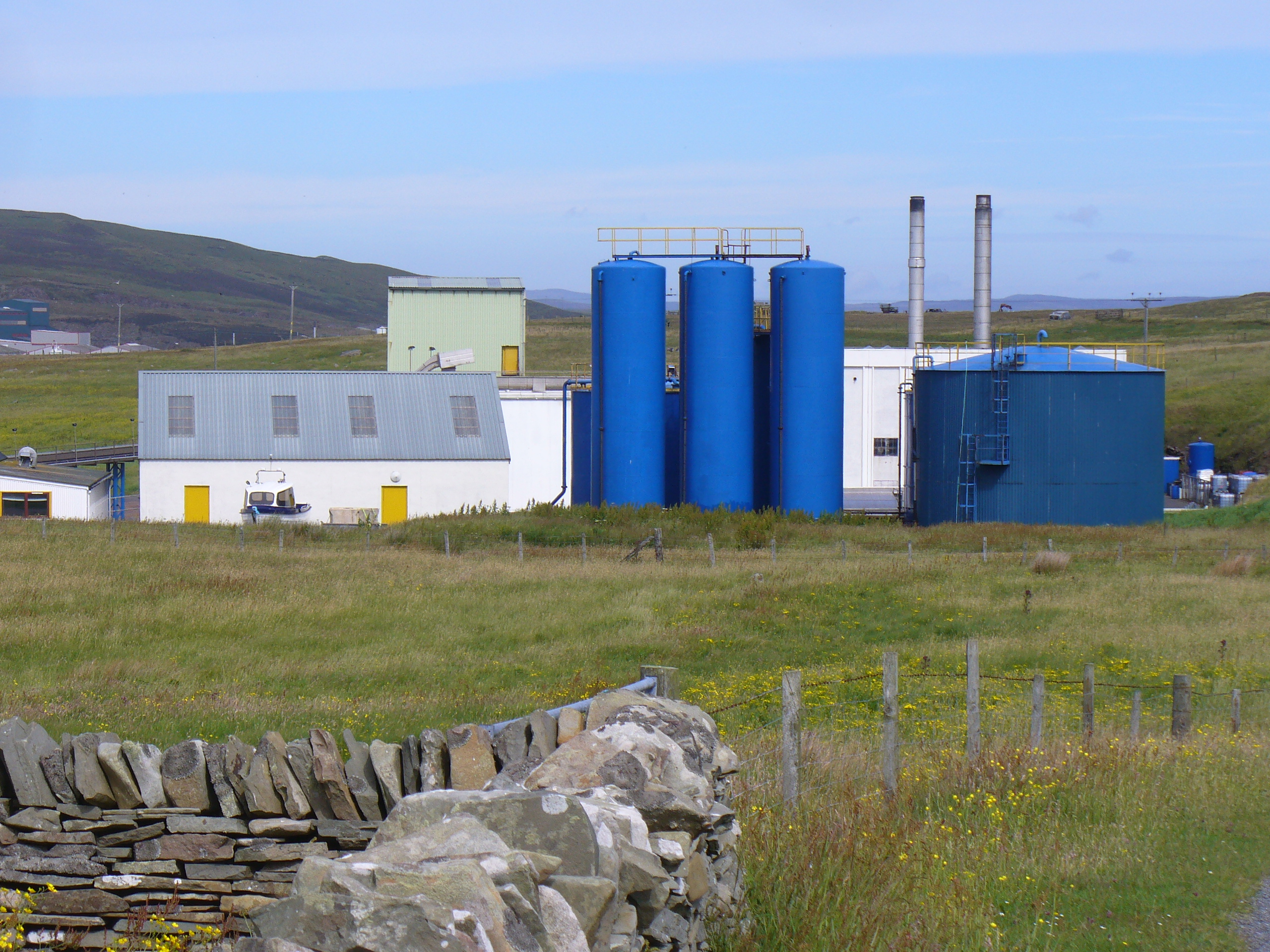 Fish meal factory at the north-west corner of Bressay.